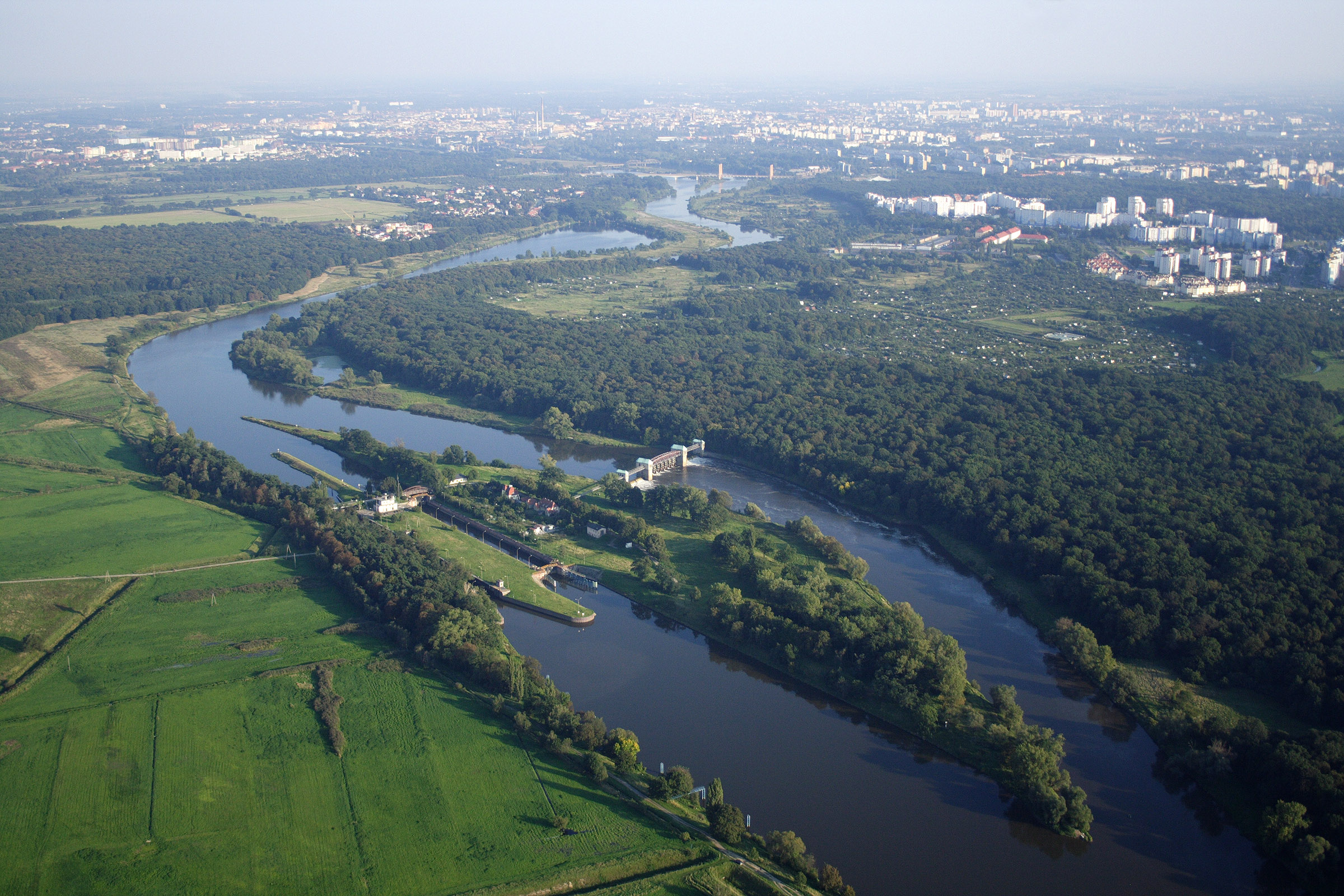 Wyspa Rędzińska we Wrocławiu z lotu ptaka z północnego zachodu. Widoczne dwie równoległe Śluzy Rędzińskie (po lewej stronie Wyspy) i Jaz Rędziński (po prawej). Po lewej stronie kadru widoczne pola irygacyjne, po prawej (na południowym brzegu rzeki) - Las Maślicki. Widoczne w oddali po prawej stronie zgrupowanie bloków z wielkiej płyty to osiedle Kozanów. W oddali widoczny przerzucony nad Odrą wantowy Most Milenijny. Za mostem Milenijnym widoczny drugi most (konstrukcja częściowo kratownicowa) - kolejowy, a za nim (w tym ujęciu nieco na lewo) - dwa wysokie kominy wrocławskiej elektrociepłowni. Zdjęcie wykonane przed rozpoczęciem budowy Autostradowej Obwodnicy Wrocławia, która przecina Odrę nad Wyspą Rędzińską bodowanym od 2008 r. Mostem Rędzińskim